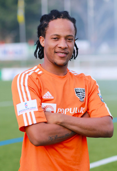 Charles Herold Jr